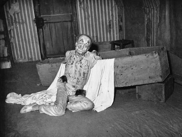 Série sur le Grand guignol : scène : [photographie de presse]